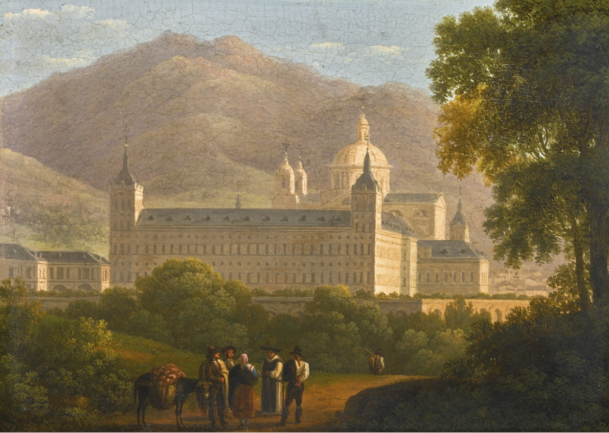 El Escorial, óleo sobre papel pegado a una lámina de estaño, 9 x 12,5 cm. Subastado en Sotheby's de Londres el 6 de junio de 2017, lote 25